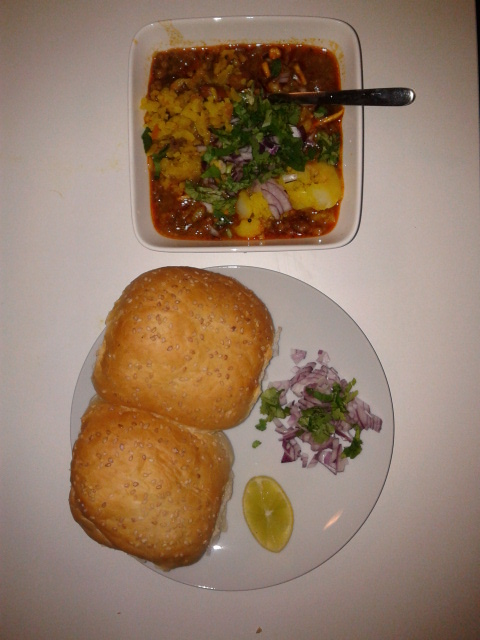 मिसळ पाव